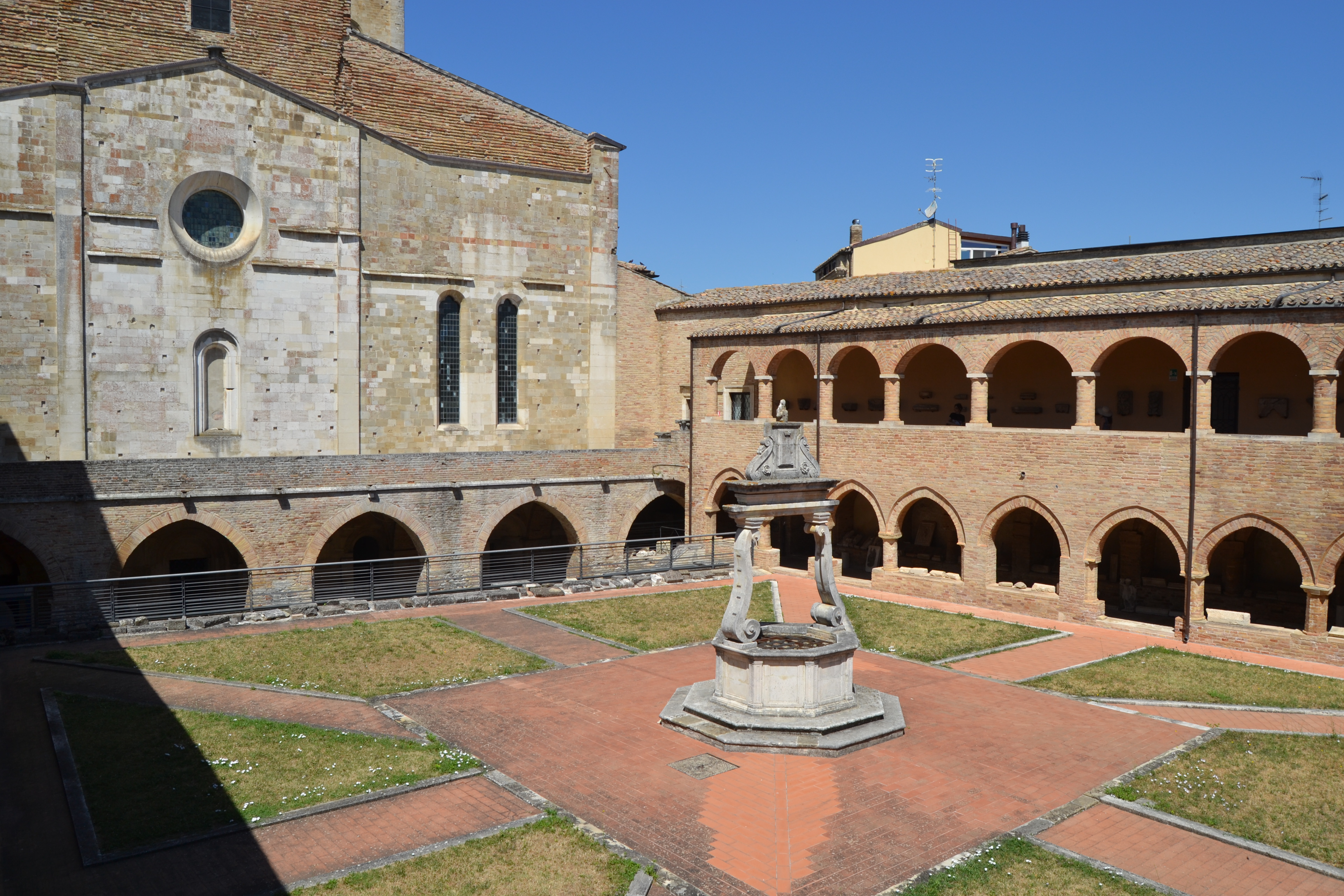 Concattedrale di Atri, chiostro (oggi adibito a Museo Capitolare)